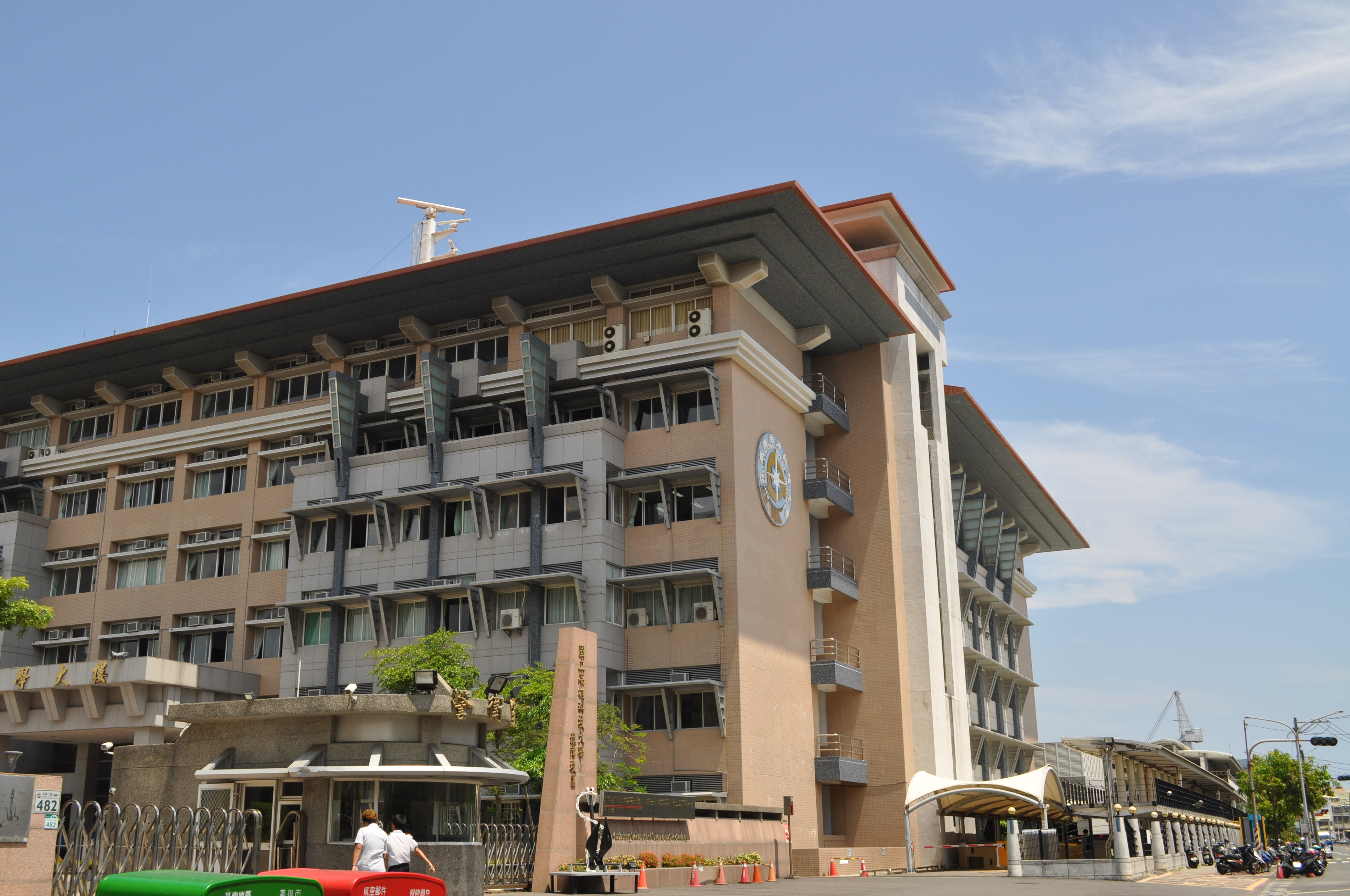 國立高雄科技大學旗津校區